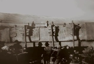 Monolito Bennet o Estela Pachamama. Preparativos para el traslado a la ciudad de La Paz en abril de 1933